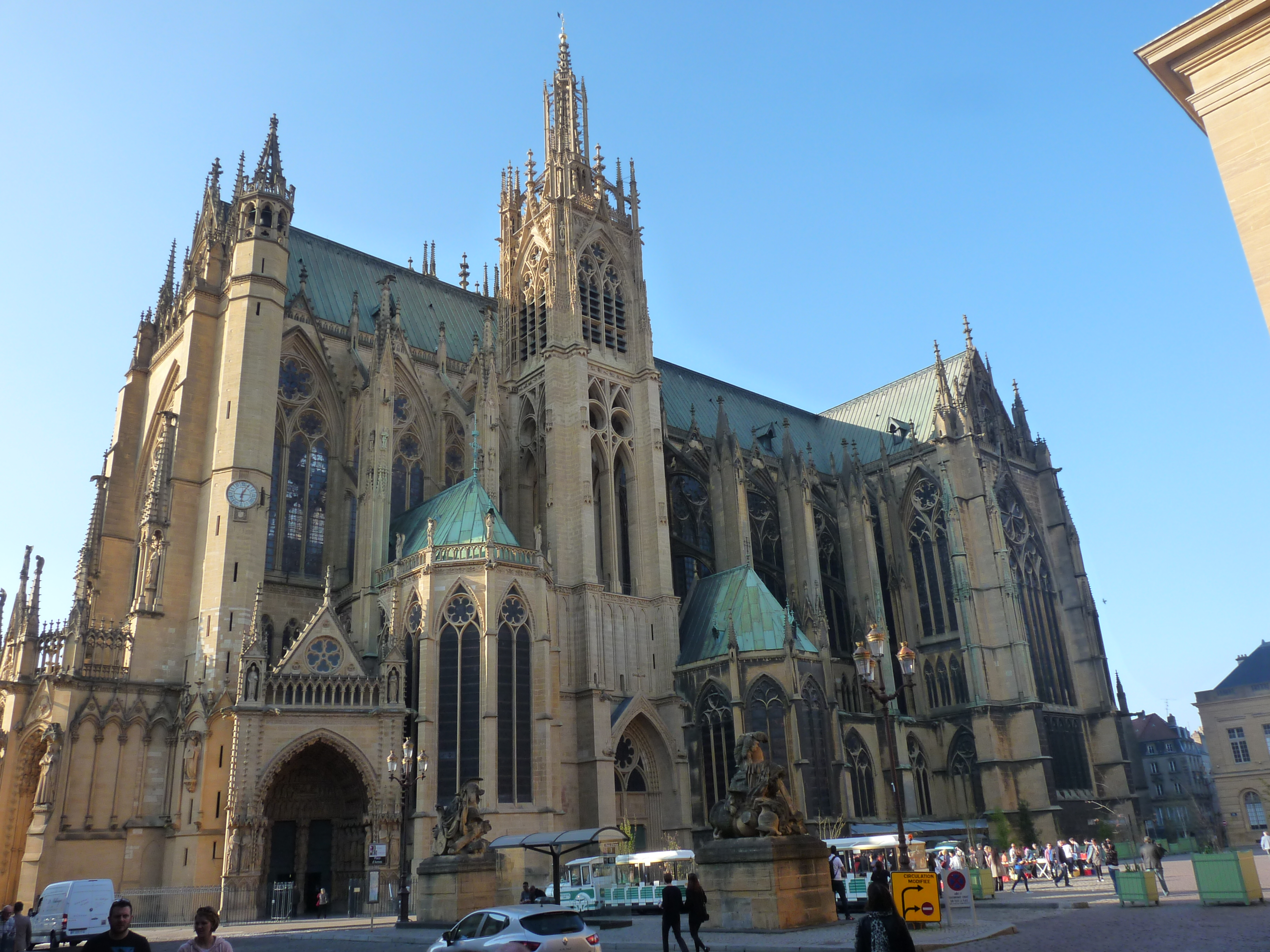 De zuidoost kant van de kathedraal in Metz